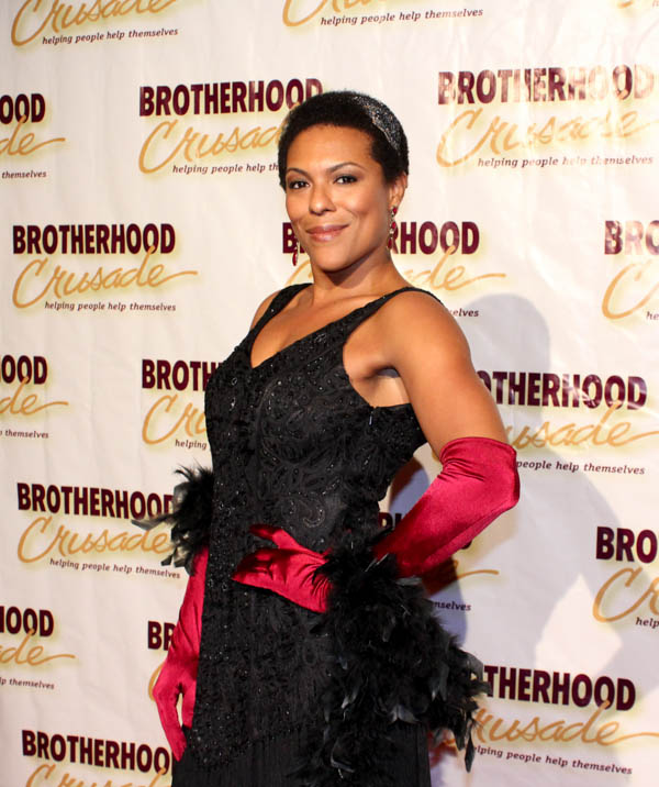 By Ashley Velez